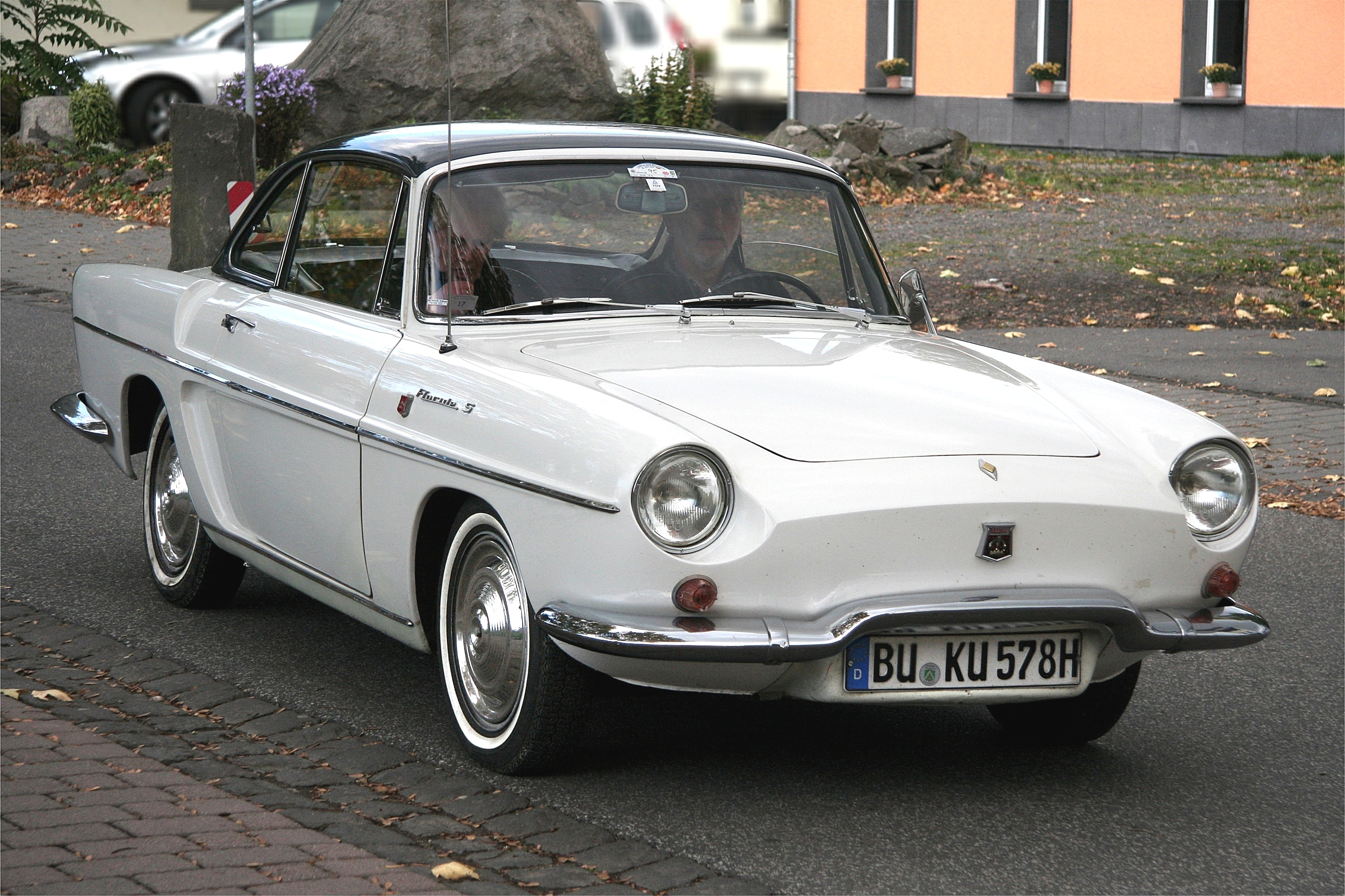 Renault Floride S mit Hardtop, Baujahr 1963